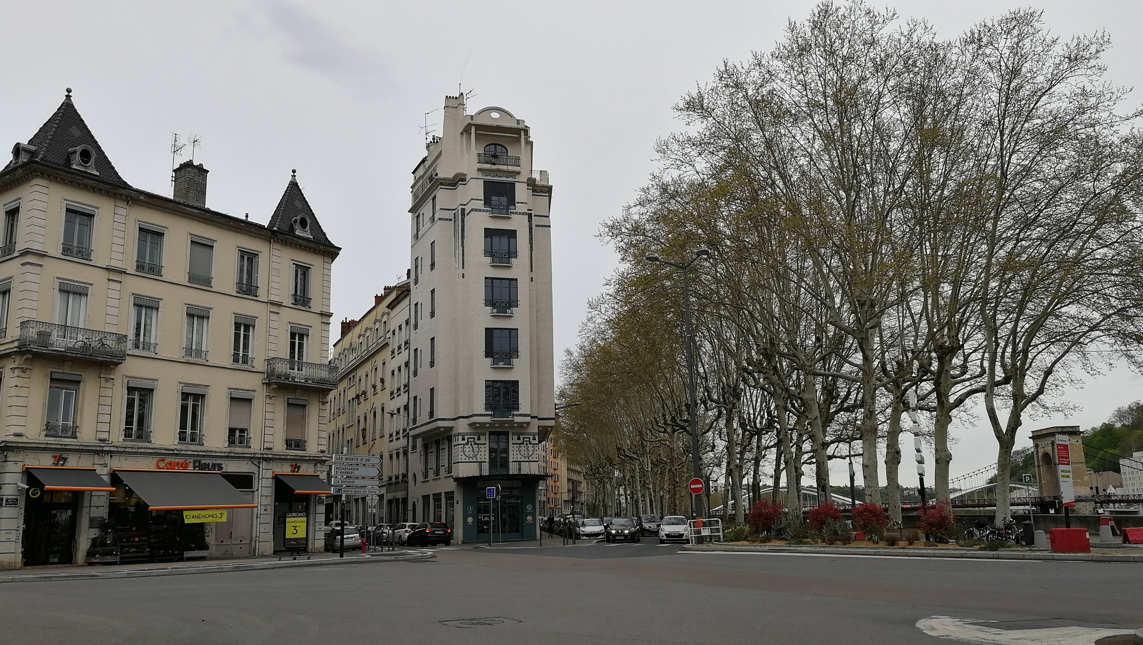 Immeuble Cateland dans le quartier de Vaise à Lyon